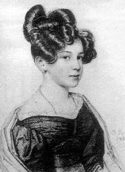 портрет Анни Андро